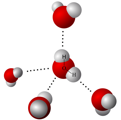 Molecole d'acqua con evidenziati i legami a idrogeno ma non i momenti di dipolo).